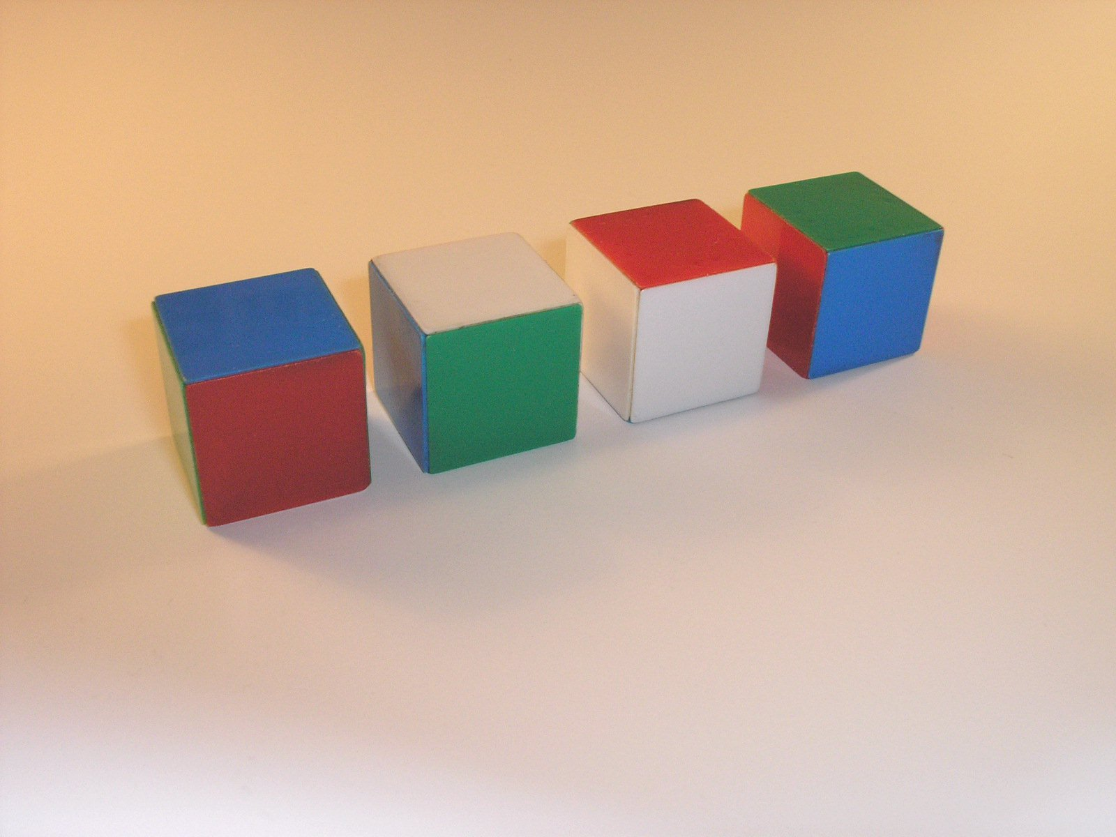 "Instant Insanity" puzzle